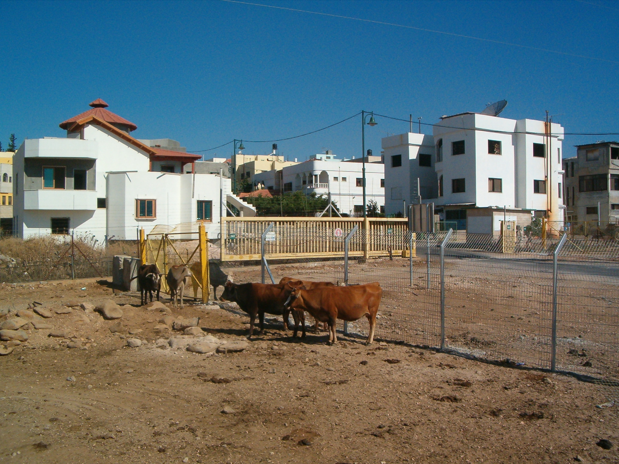 שער הכניסה לחלקו הדרומי (הישראלי) של הכפר ע'ג'ר